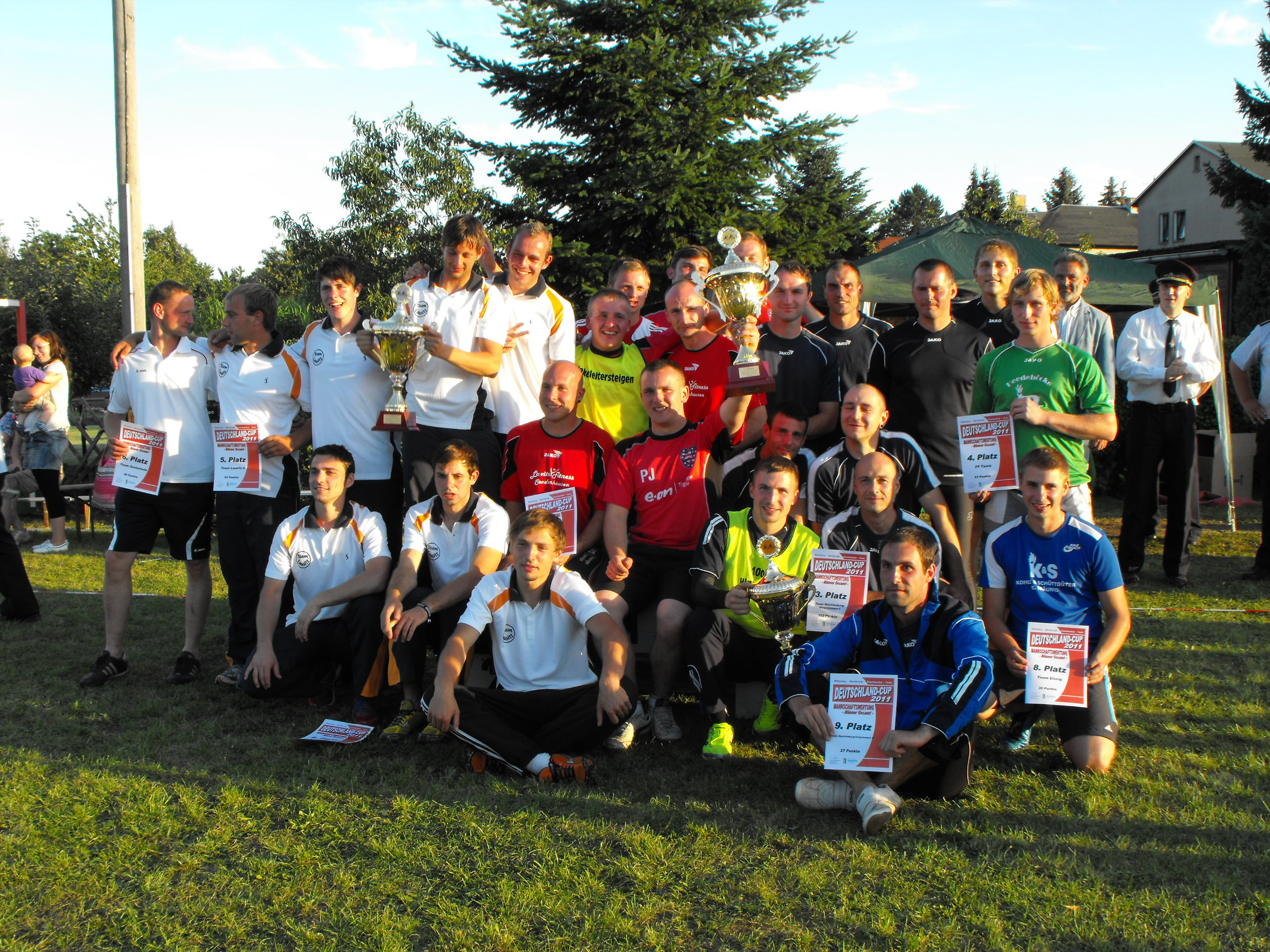 Siegerehrung des Deutschlandpokals im Feuerwehrsport 2011. Die Thüringenauswahl siegt vor Team Lausitz und Team Mecklenburg-Vorpommern.